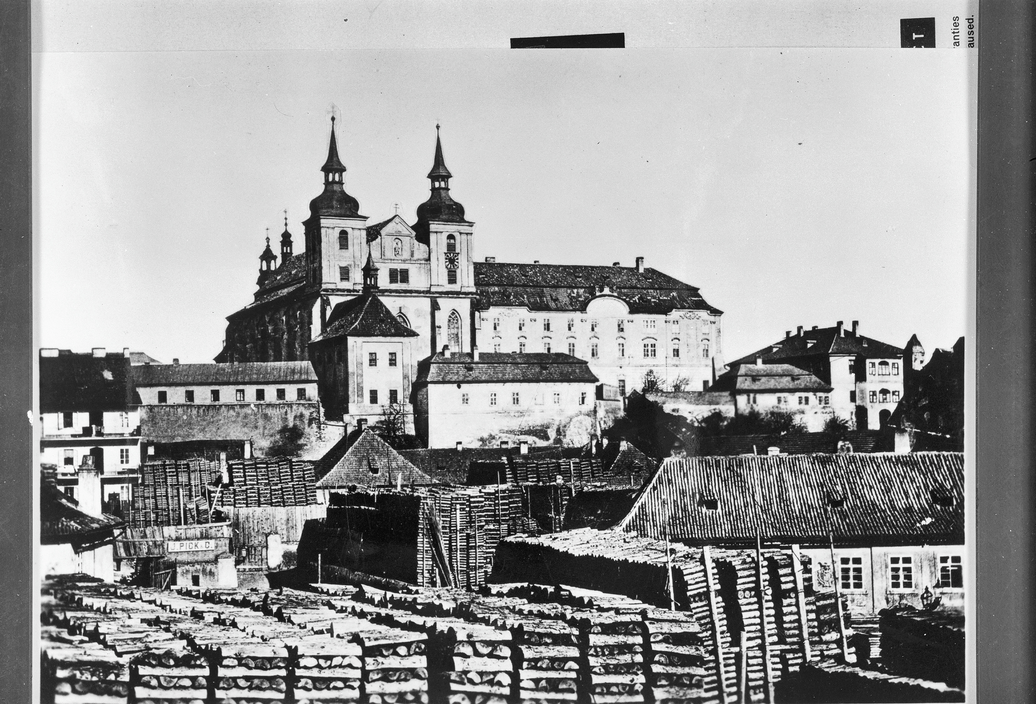 Emmauskerk: Emmauskerk, overzicht, reproductie van foto